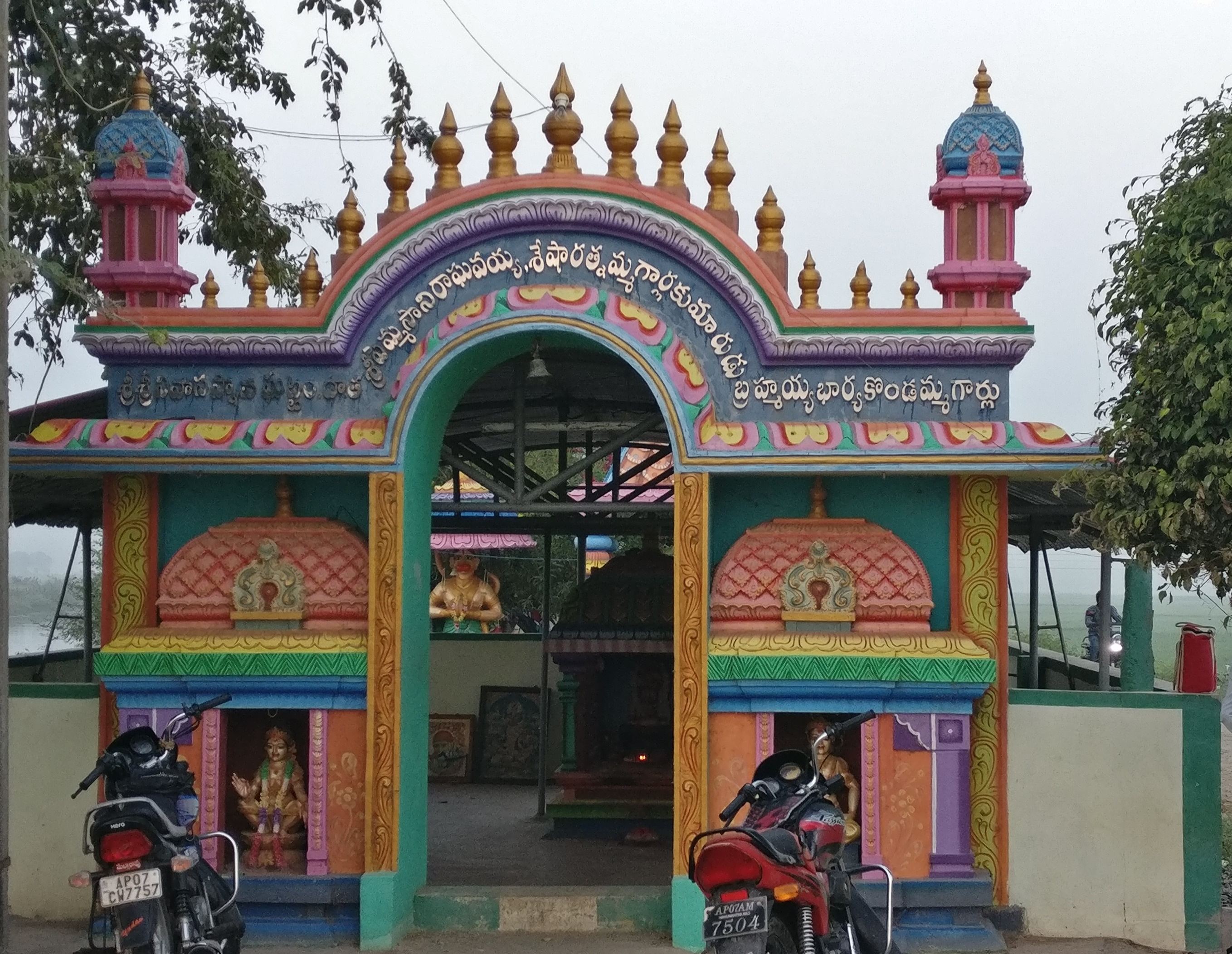 వివాహానికి ముందు వెంకటేశ్వర స్వామికి ఎదురు నడిచే ప్రతి ఒక్కరూ ఊరికి దక్షిణాన ఉన్న నాగార్జునసాగర్ కాలువ దగ్గర ఉన్న ఈ ఆలయానికి వచ్చి పూజలు చేయాల్సిందే. ఇక్కడ పూర్వకాలం నుంచి ఈ ఆచారం ఉంది.